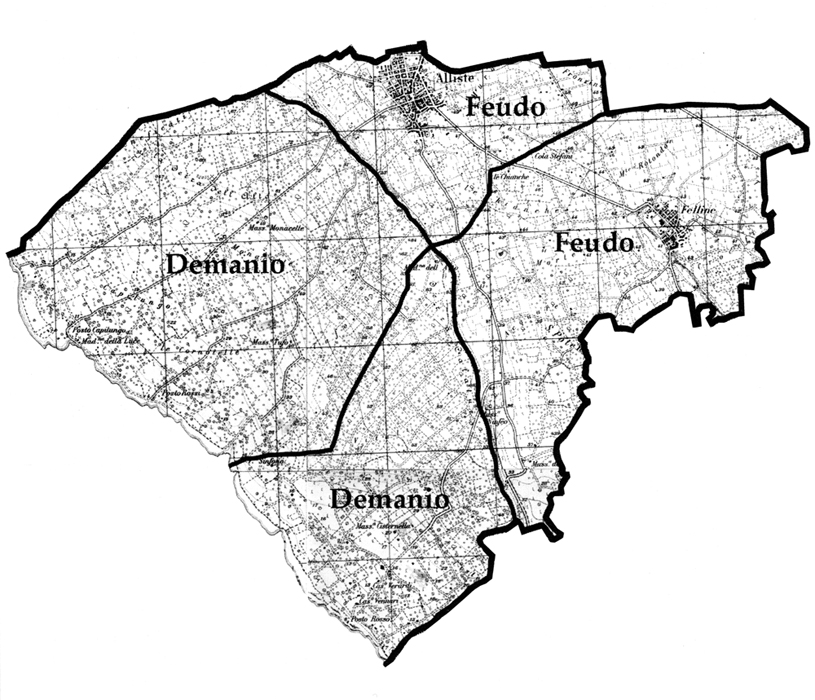 Description= Il territorio di Alliste con la delimitazione del demanio di Alliste (in alto) e di quello della frazione Felline. Source= own work Date= 1999 Author= Antonio47